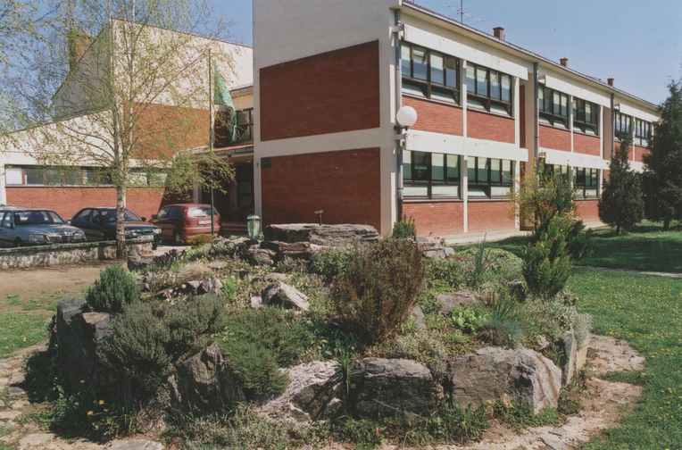 OŠ "Vladimir Nazor" Trenkovo